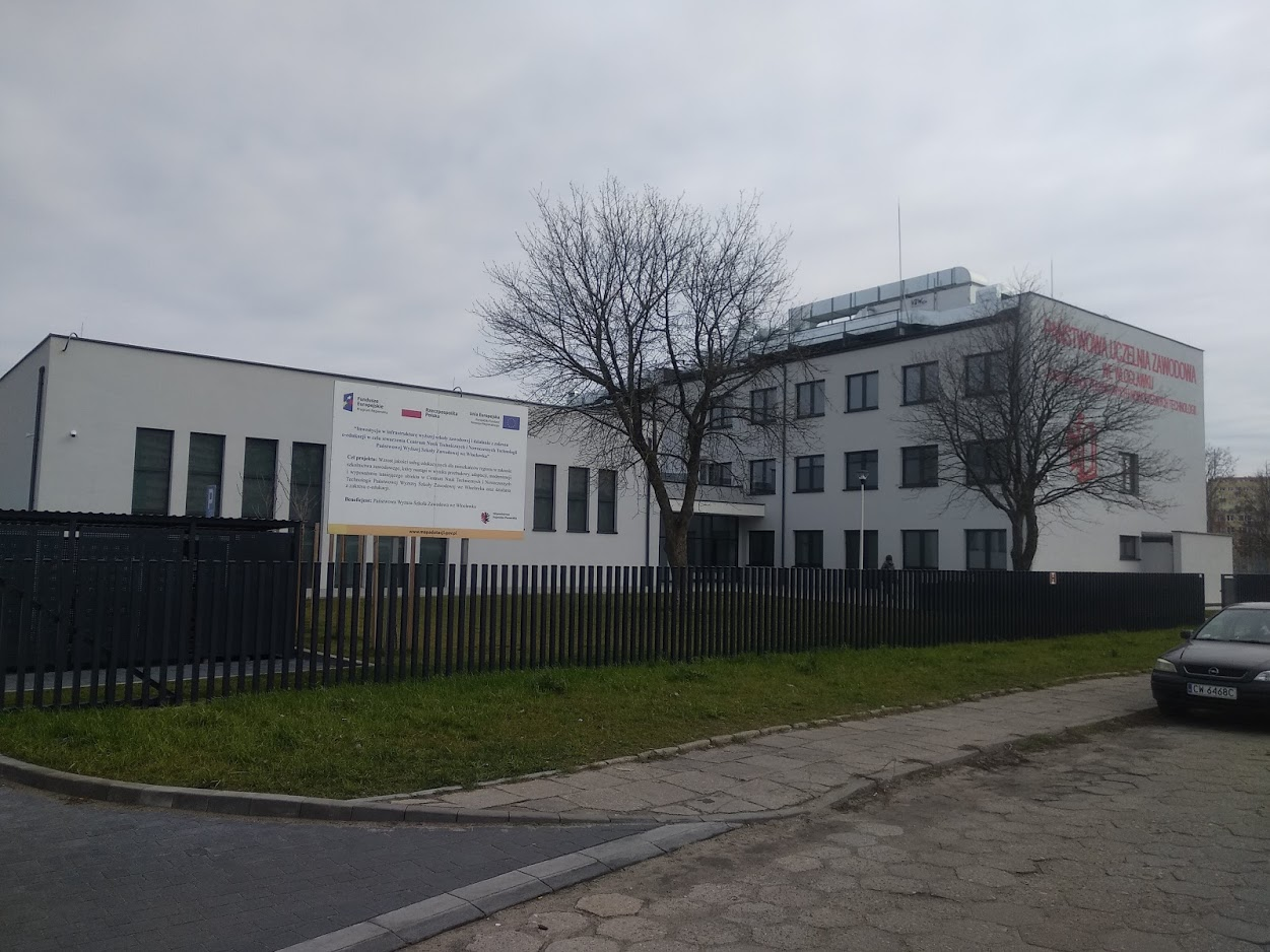 Centrum Nauk Technicznych i Nowoczesnych Technologii Państwowej Uczelni Zawodowej (ul. Energetyków, 2020 r.)